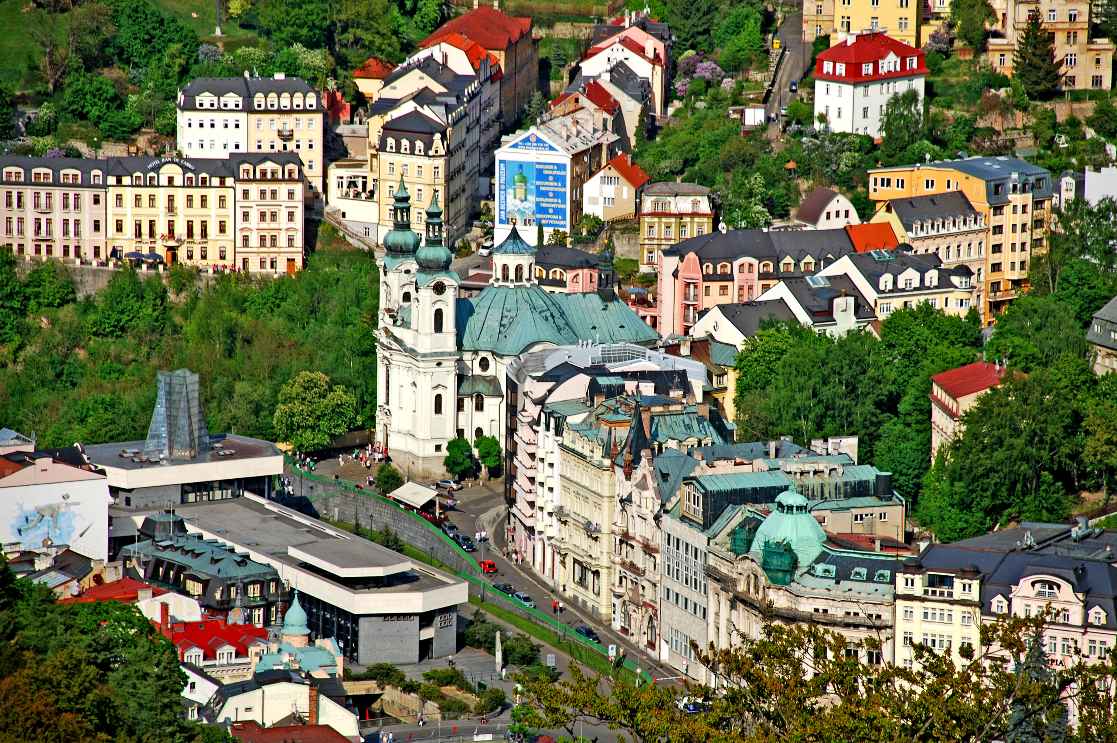 Карловы Вары